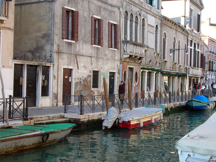 "Fondamenta" (= via che corre lungo un canale) veneziana.